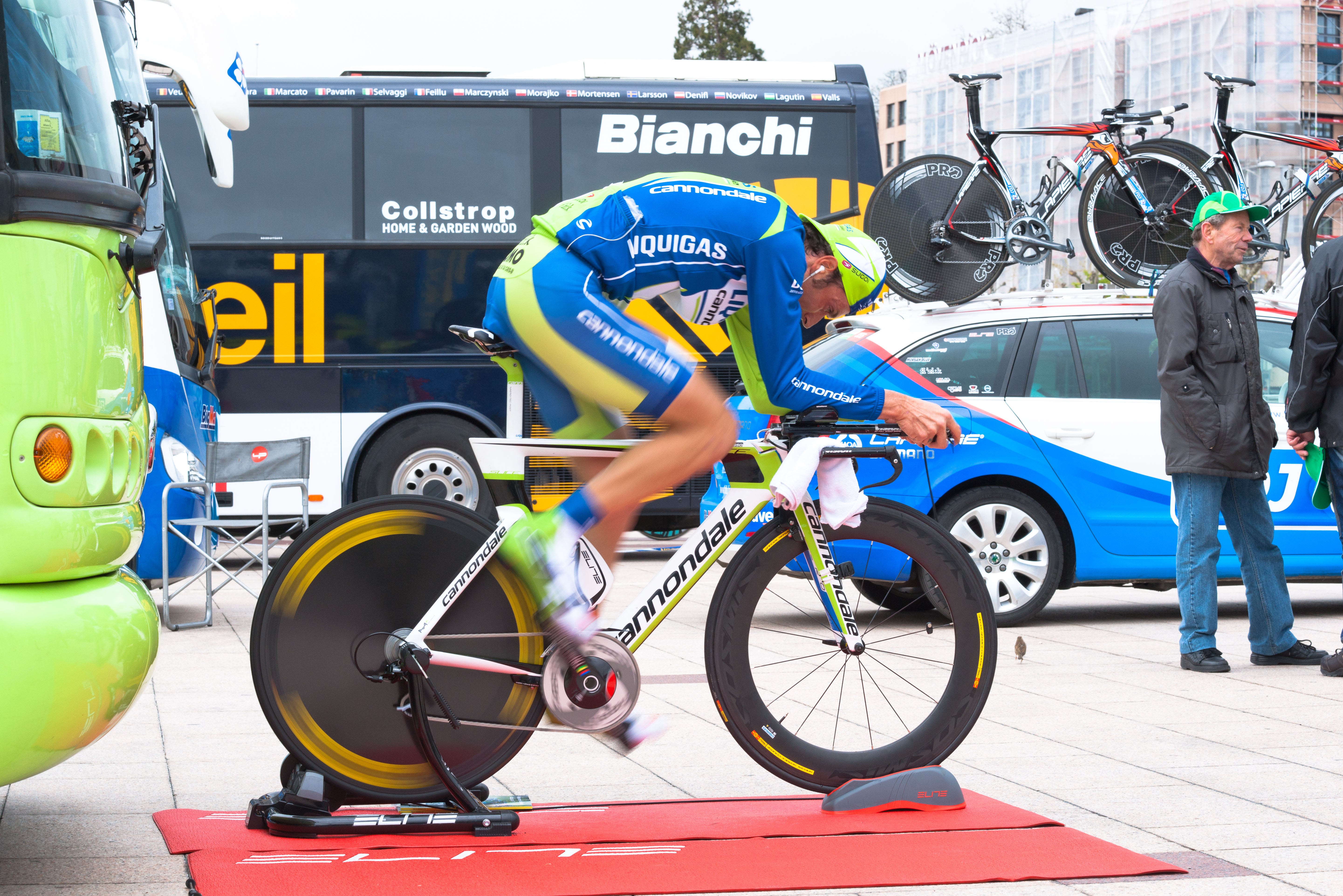 Ivan Basso à l'échauffement du prologue du Tour de Romandie 2012.